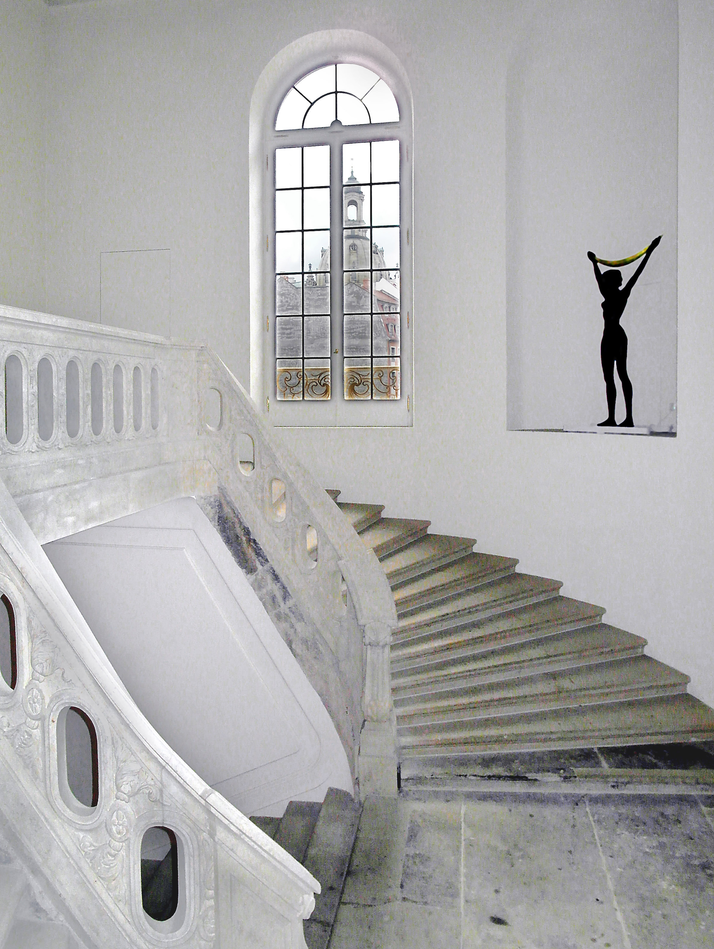 03.10.2012 Dresden-Altstadt: Tzschirnerplatz. Kurländer Palais der Grafen Wackerbarth (urspr. 1728/29 von Johann Chr. Knöffel). Krubsacius-Treppenhaus von 1764. Wiederaufbau 2006-2008. [SAM0733&0737.JPG]20121003125MDR.JPG(c)Blobelt